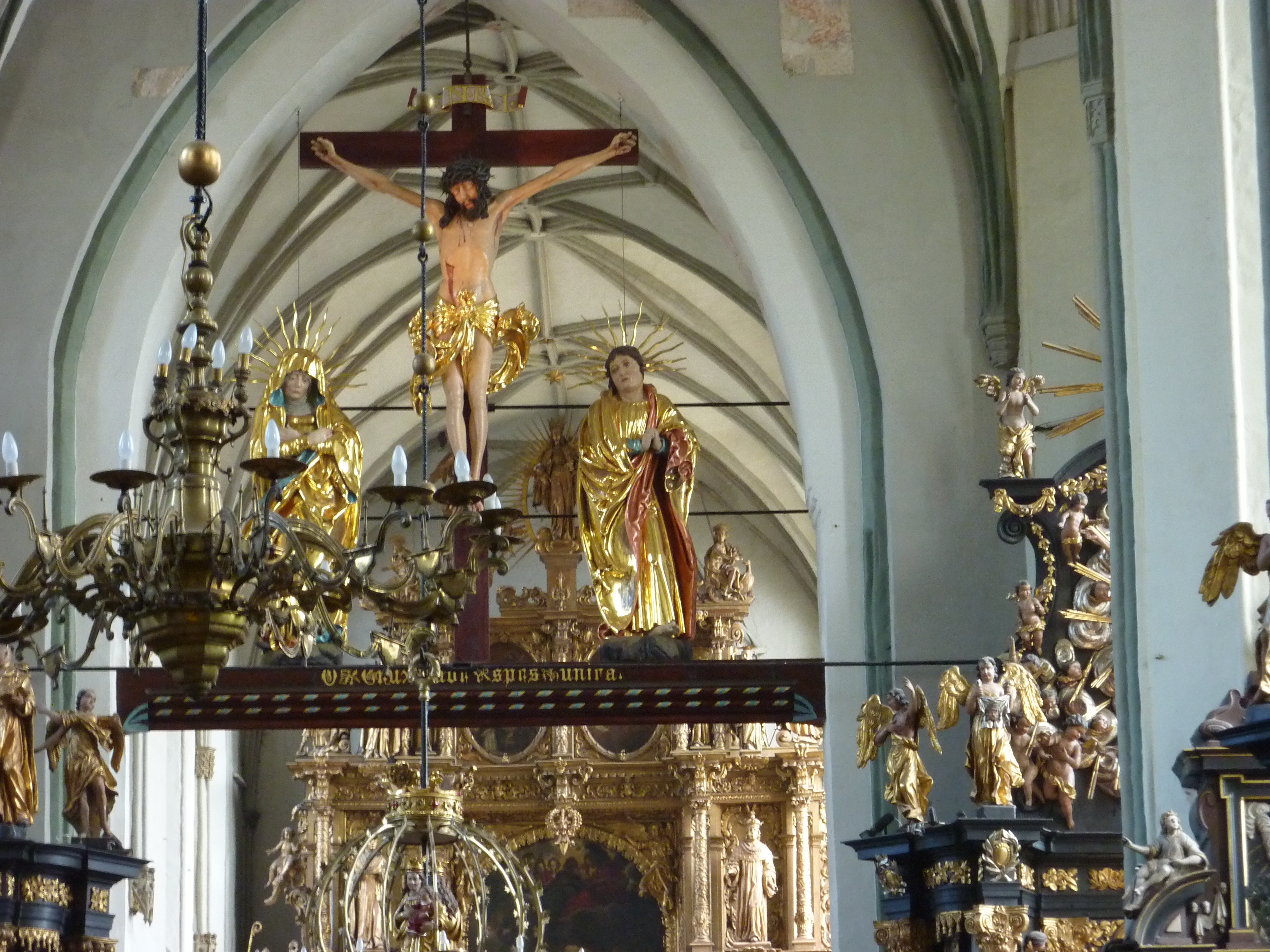 Wnętrze bazyliki św. Mikołaja w Gdańsku